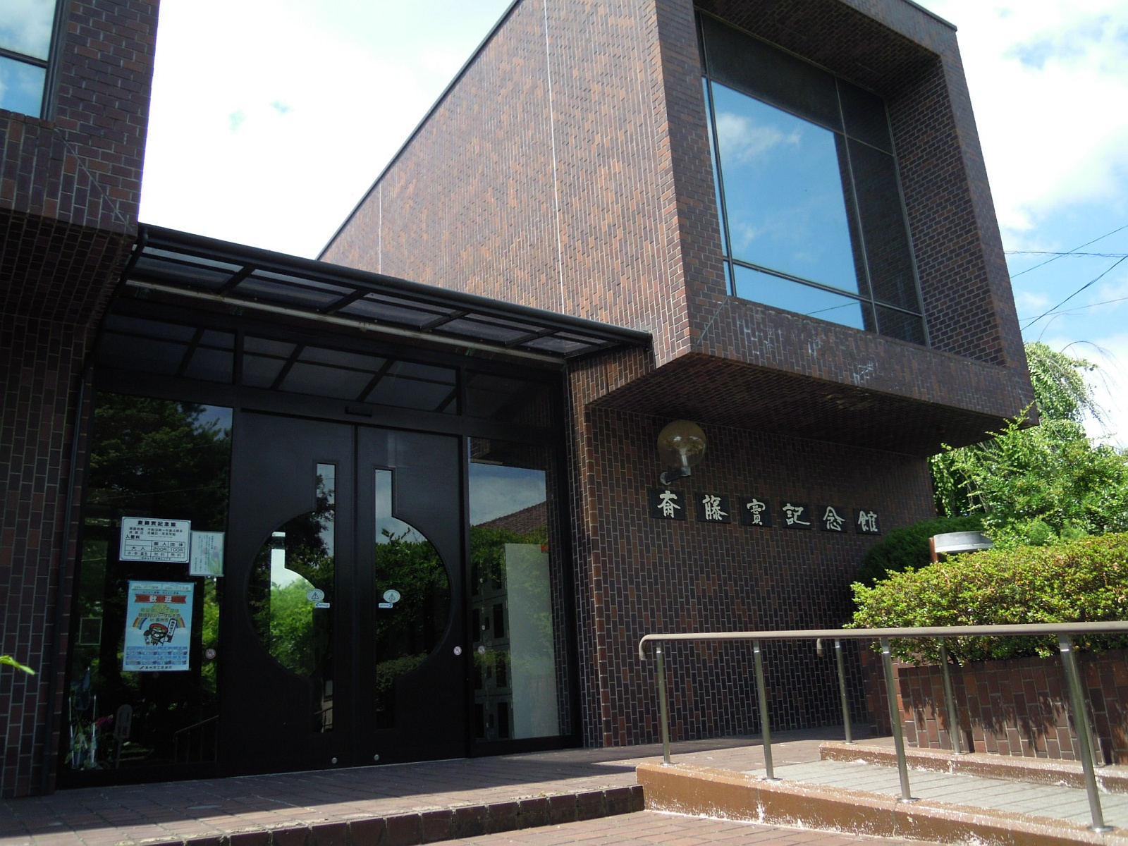 岩手県奥州市にある斎藤實記念館入口